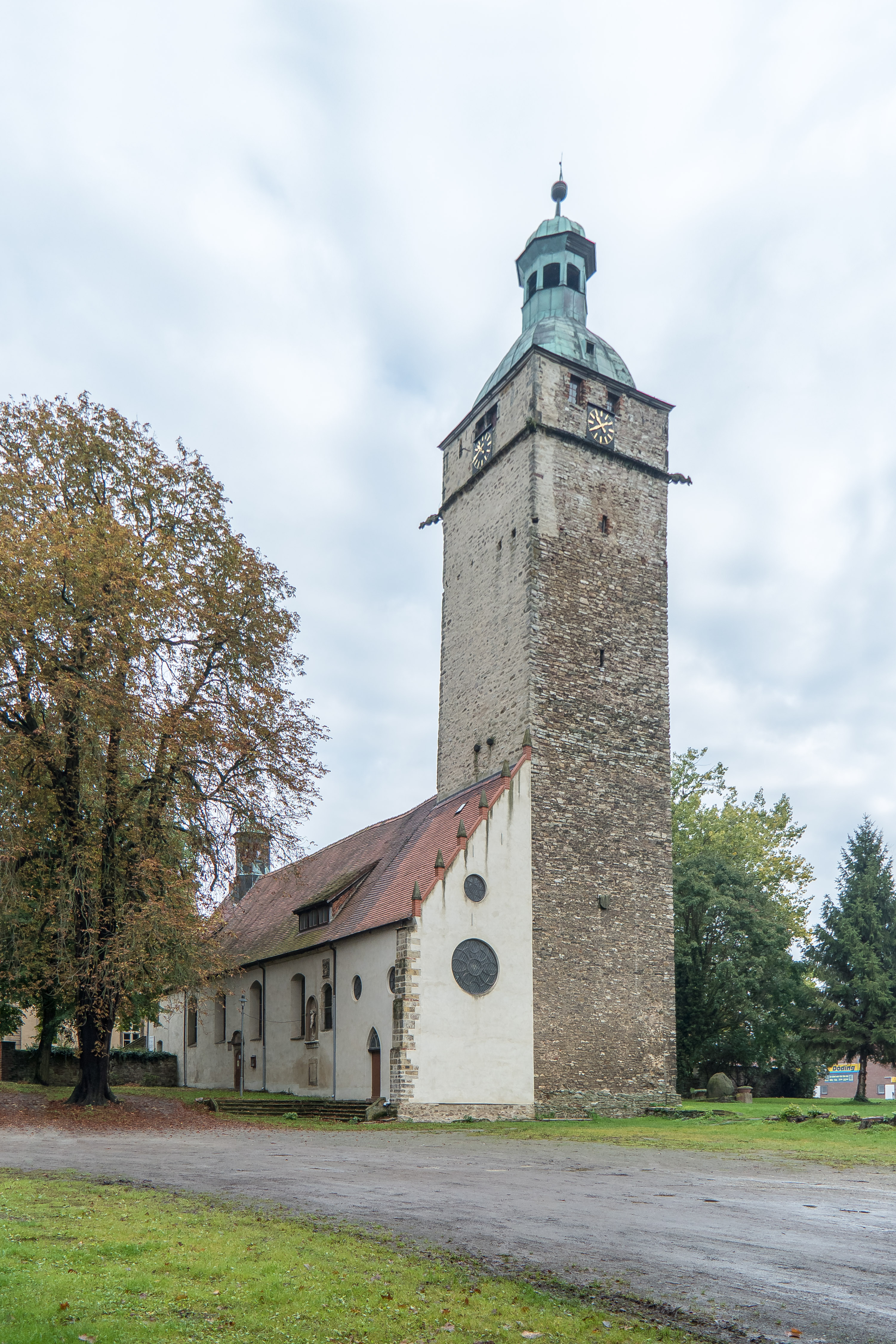 Hausmannsturm Erxleben einbezogen und Bestandteil der Schlosskirche St. Godehardt